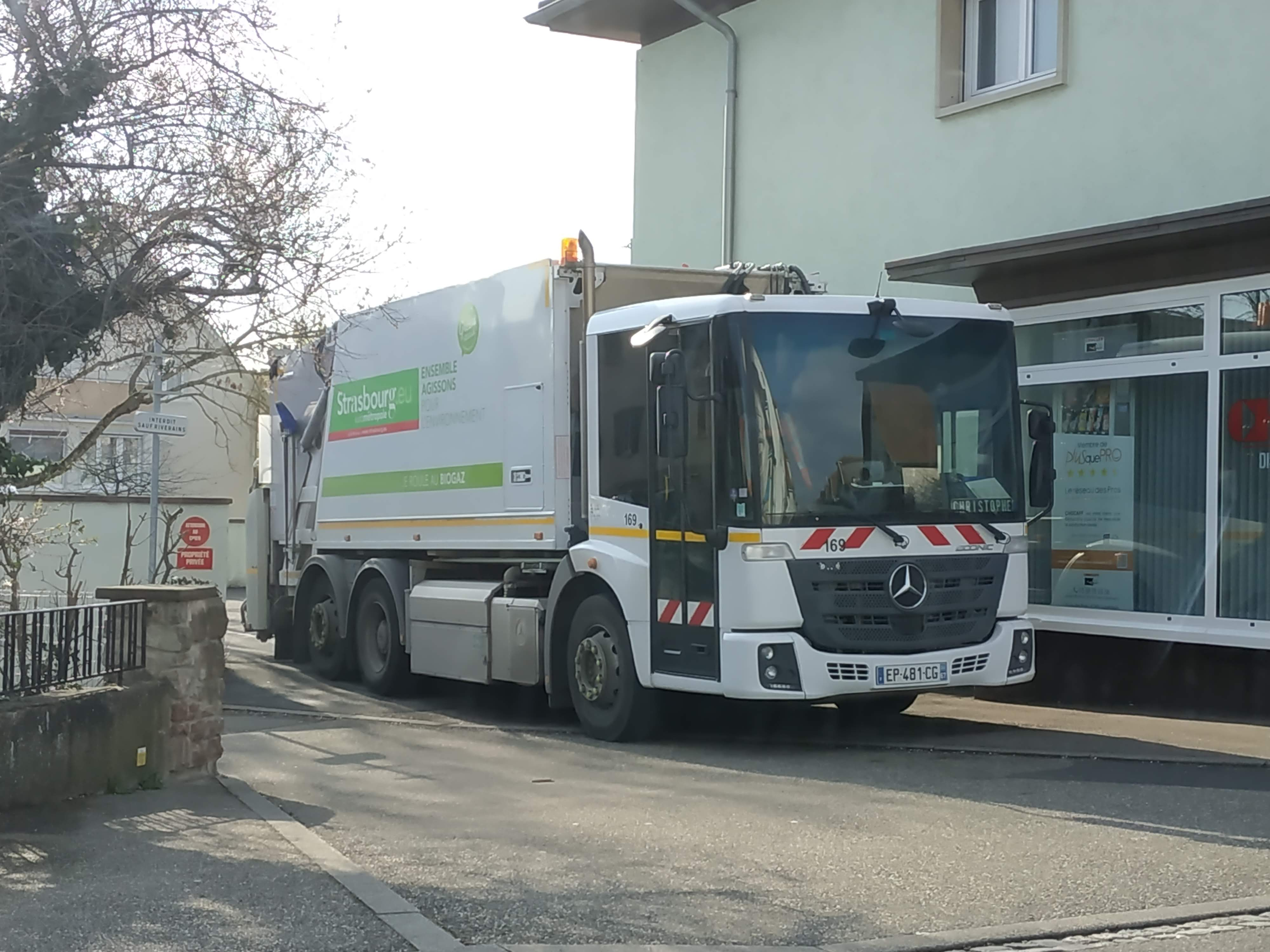 Camion-poubelle Mercedes-Benz à Strasbourg